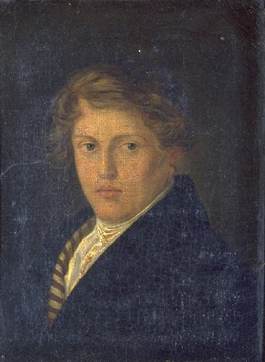 Self-portrait